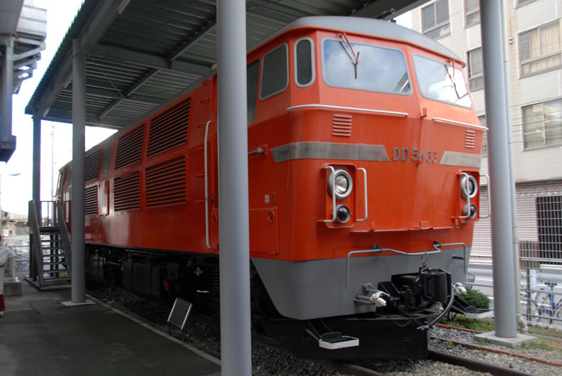 国鉄DD54型ディーゼル機関車 2006年12月10日 大阪交通科学博物館 投稿者撮影